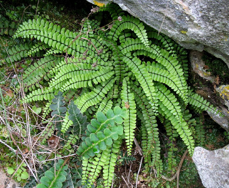 Asplenium trichomanes ssp. quadrivalens